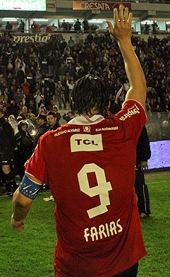 Ernesto Farias